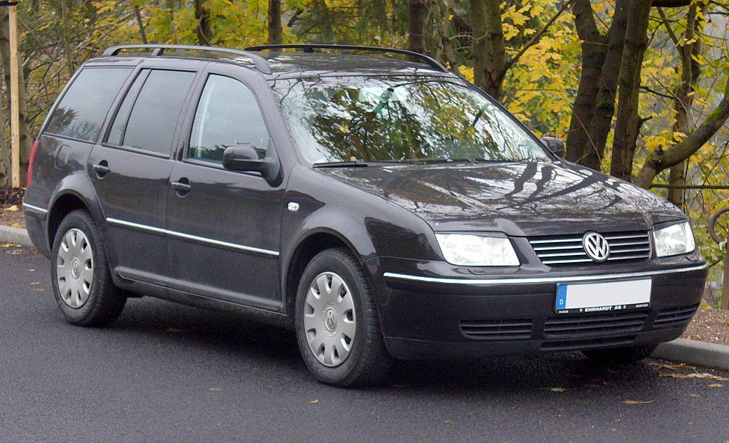 VW Bora Variant